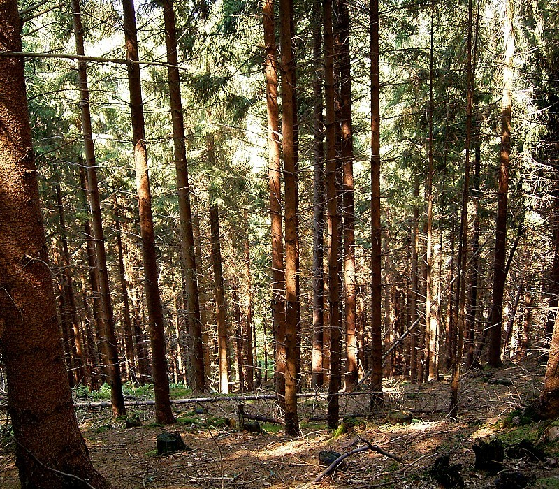 Picea abies